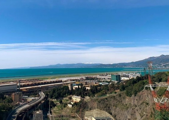 L'abbazia di Sant'Andrea alla Colombara di Genova (Cornigliano - Sestri Ponente), al centro dell'immagine, vista dai rilievi posti a est.